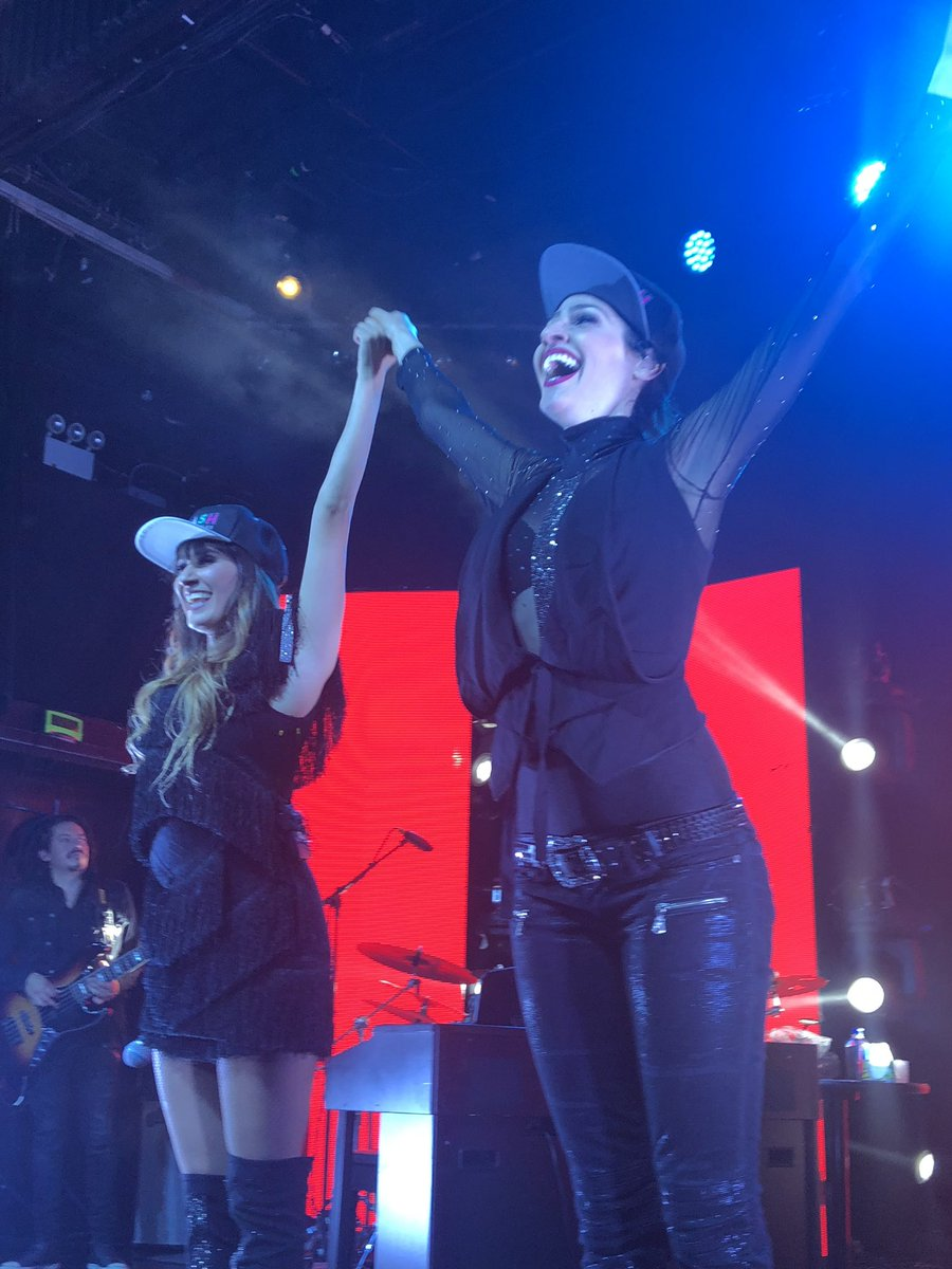 Ha*Ash Irving Plaza NY